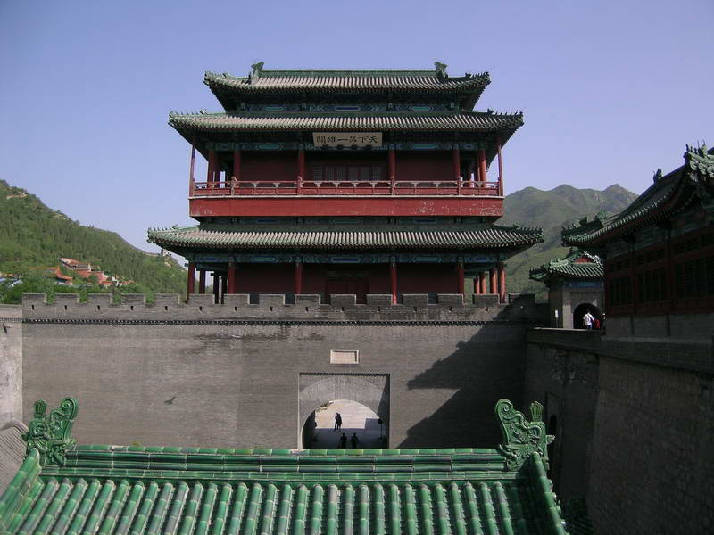 居庸关(JuyongguanPass)